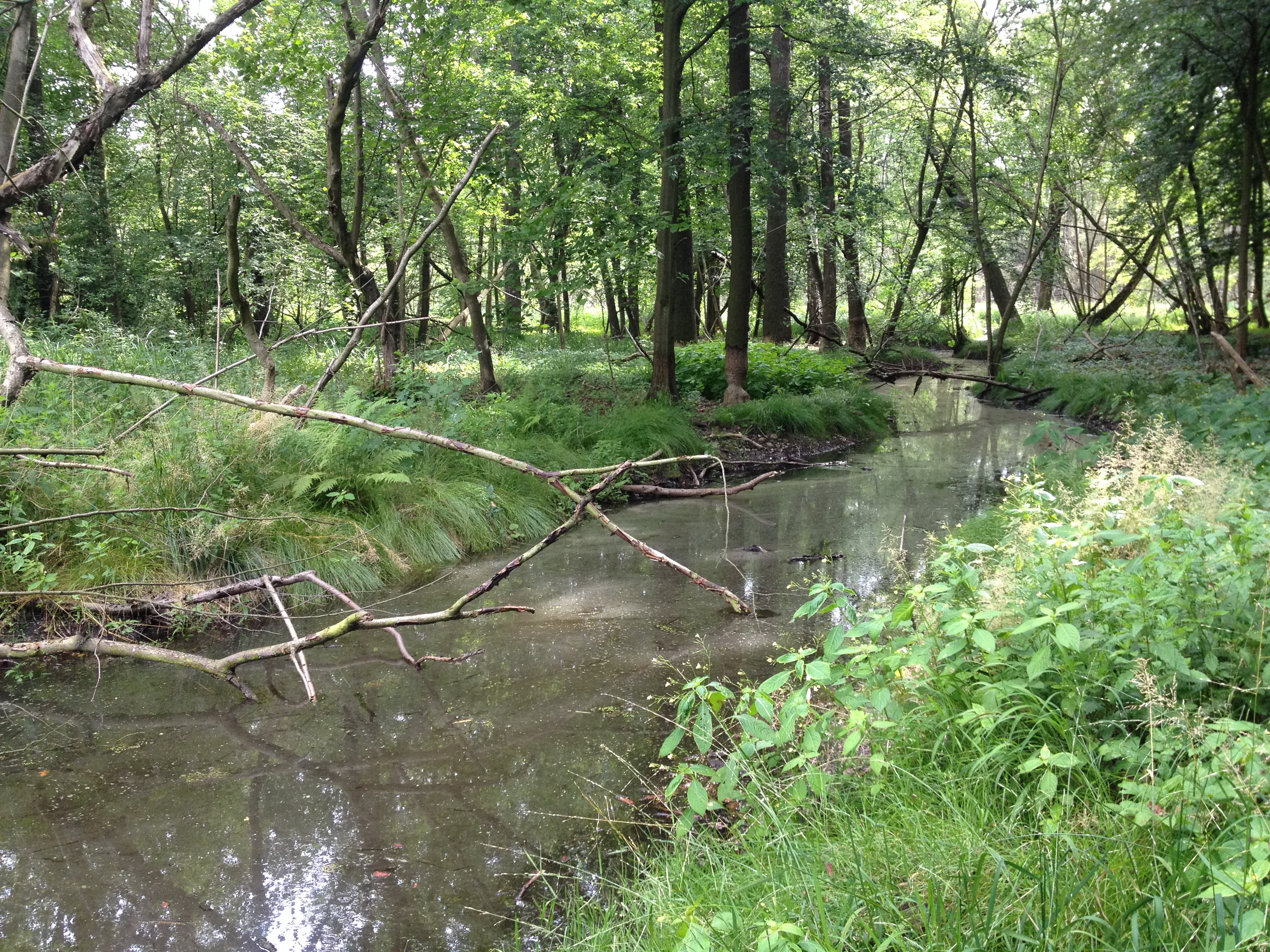 Jütrichauer Busch; Hakengraben im Juni